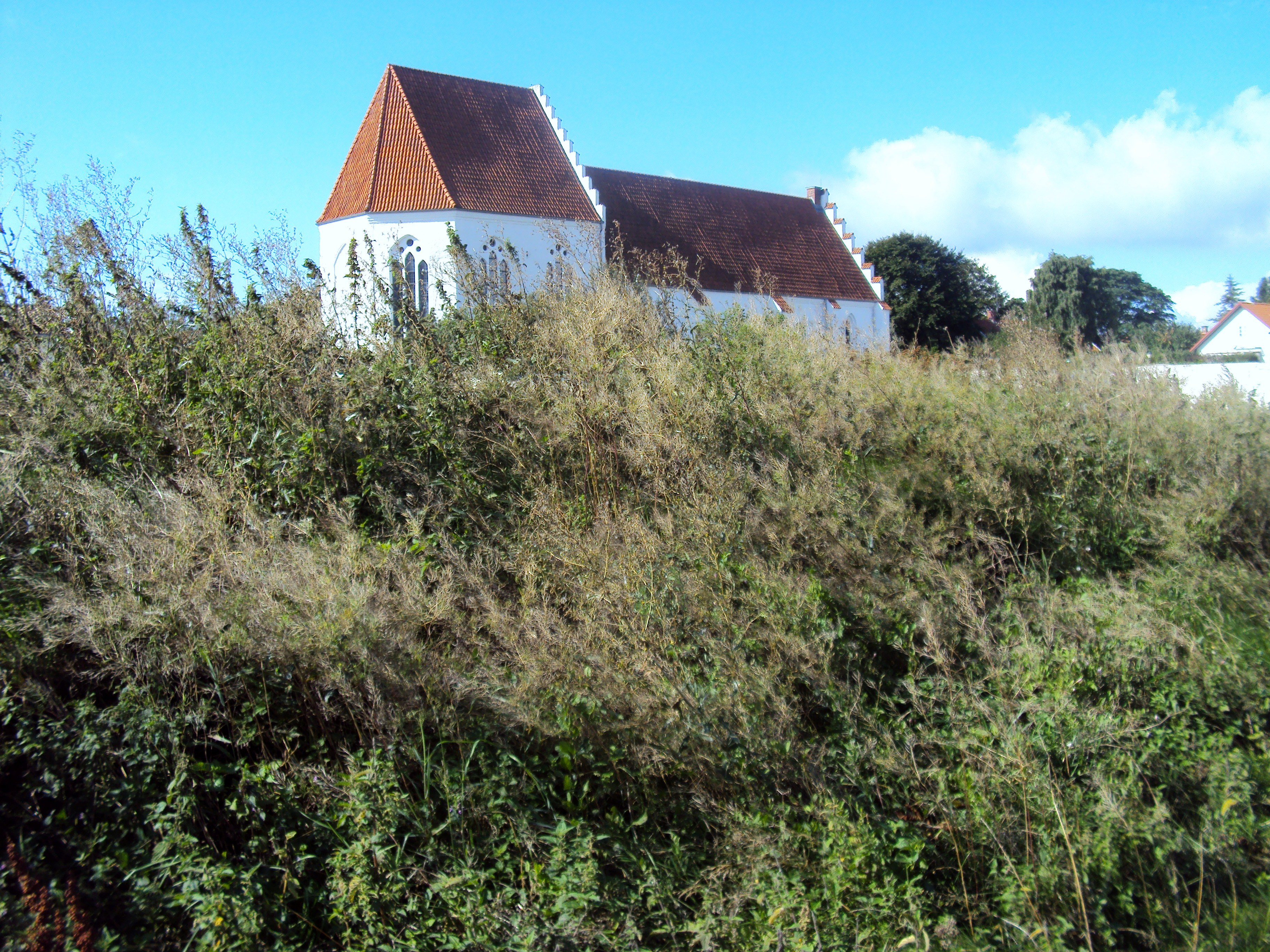 Skanörs kyrka bakom tångvall, tagen något hukad